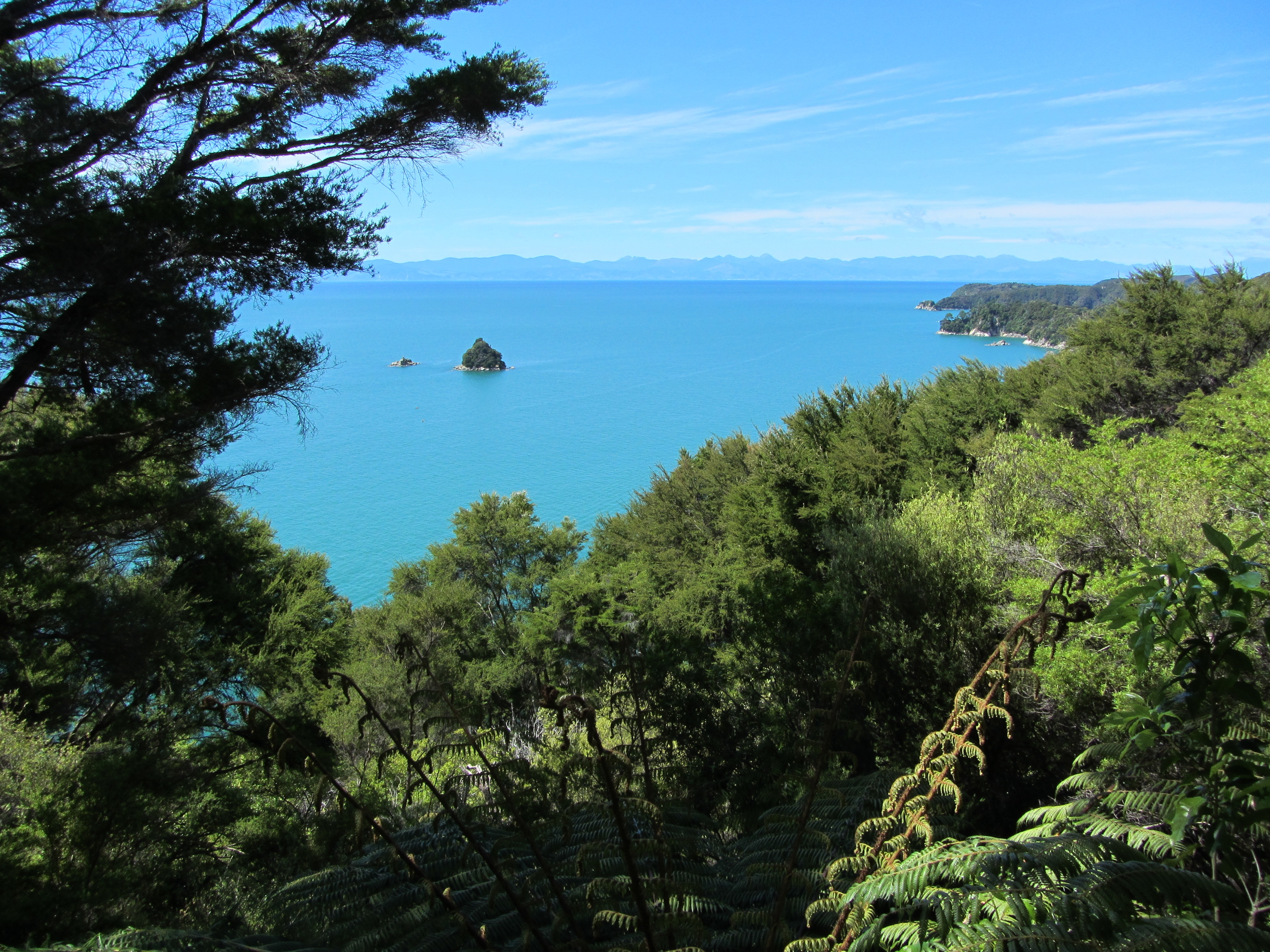 Tasman Bay